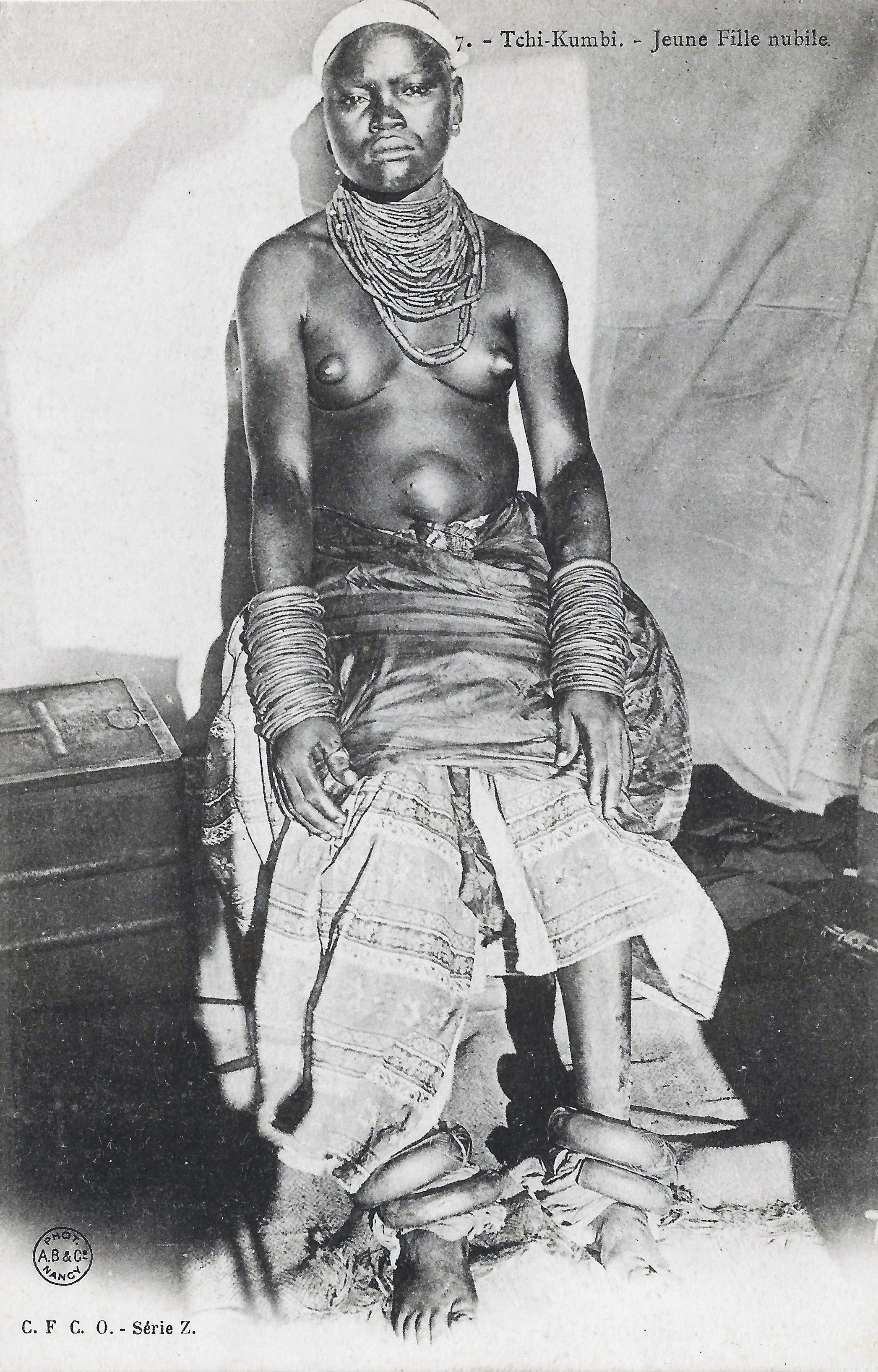 Tchi-Kumbi. Jeune fille nubile. C.F.C.O., série Z Phot. A.B. & Cie, Nancy [Albert Bergeret]